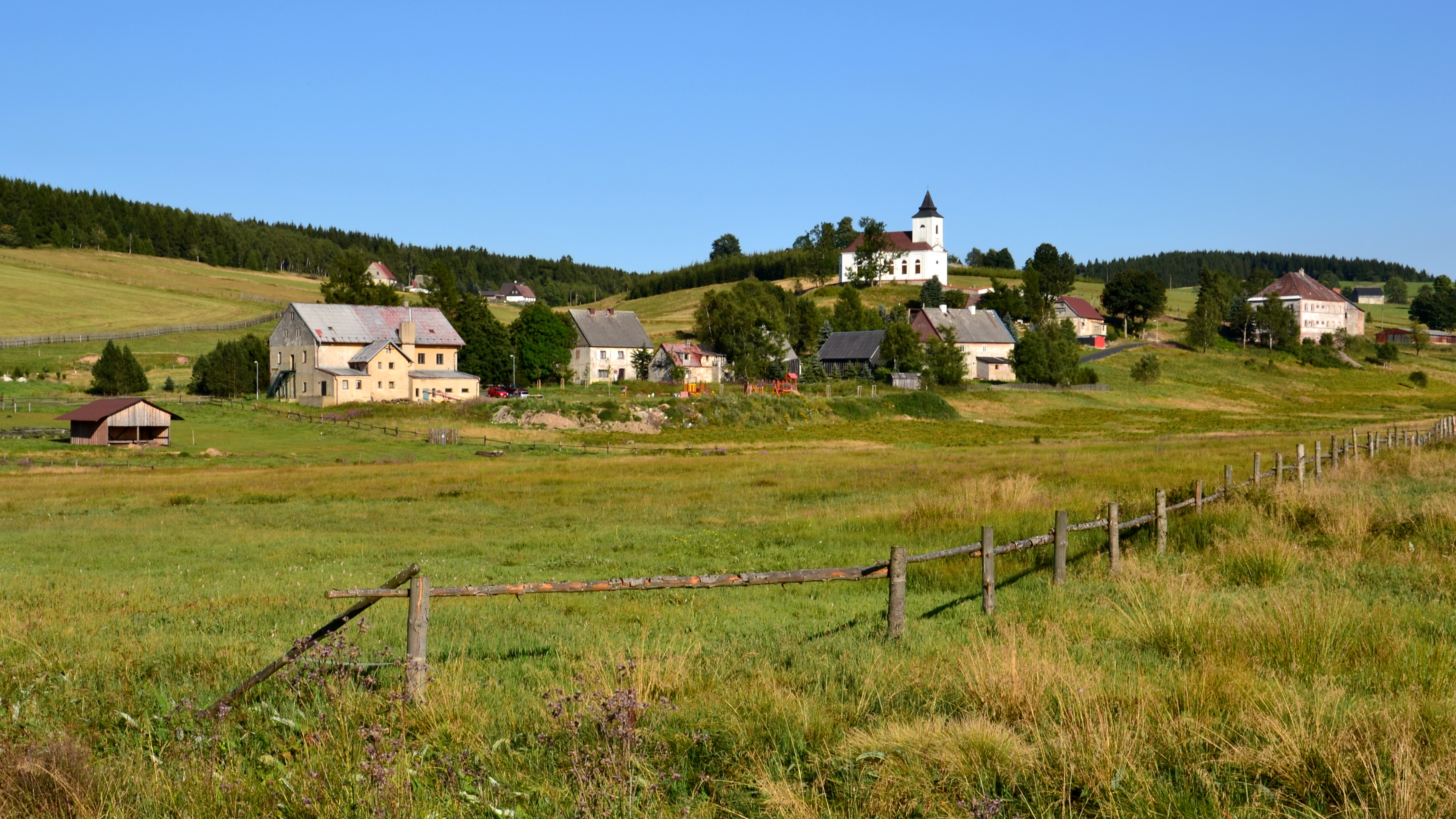 Kalek – východní část vesnice s kostelem svatého Václava